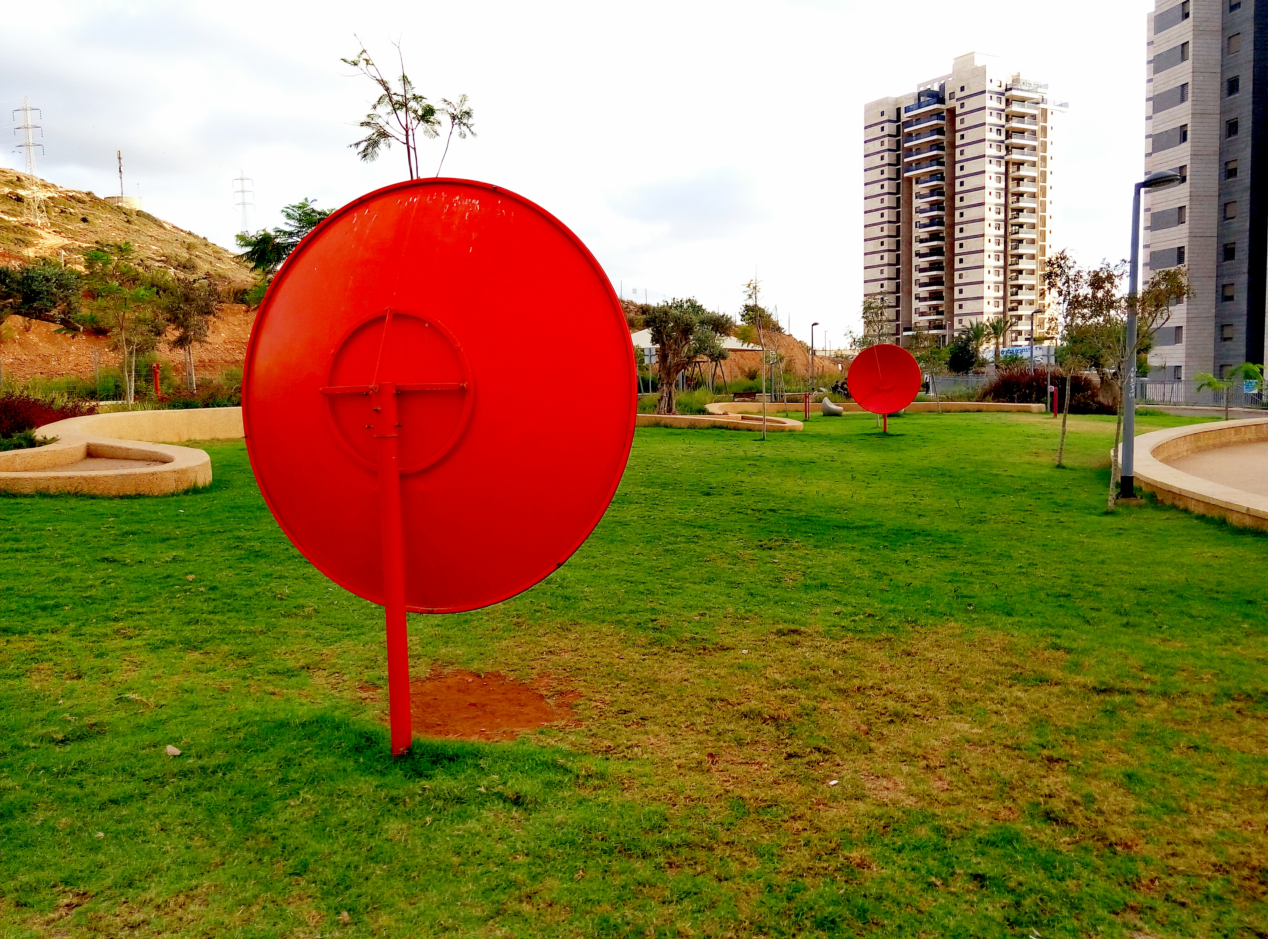 מתקן צלחות פראבולואיד בפארק הפרפר רמת הנשיא